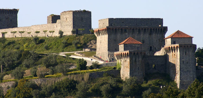 Castle of Ourém, Portugal